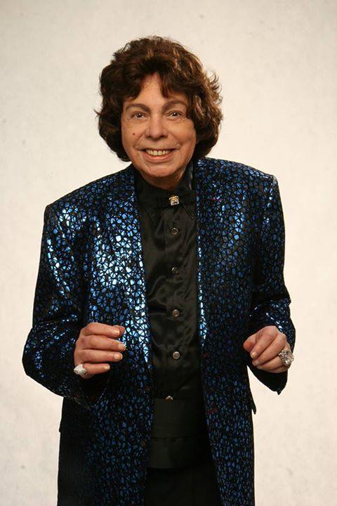 Cauby Peixoto, 2015.